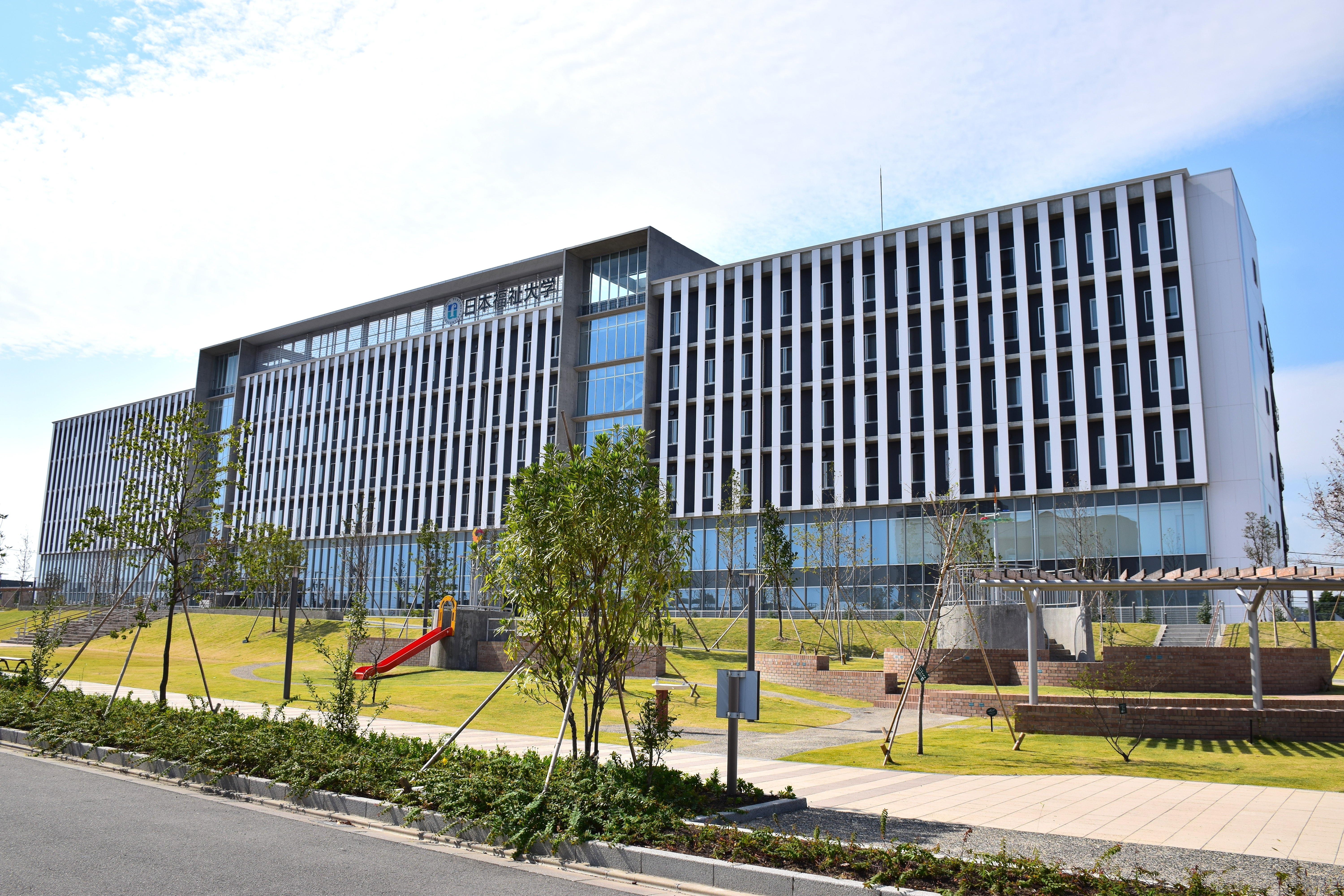 日本福祉大学東海キャンパス